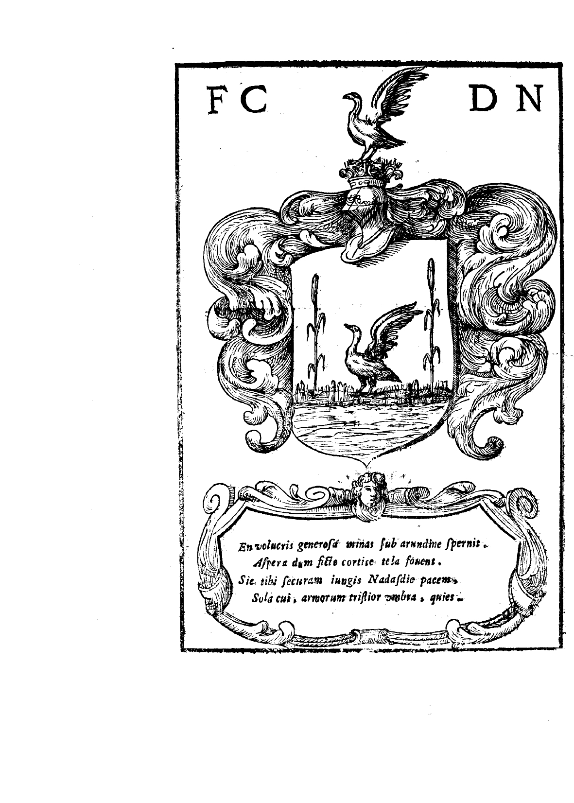 Athanasii Kircheri … Arithmologia siue De abditis numerorum mysterijs qua origo, antiquitas & fabrica numerorum exponitur; …. - Romae : ex typographia Varesij, 1665. - [16], 301, [11] p., [3] c. di tab. ripieg. : ill., antip. ; 4º . Antiporta